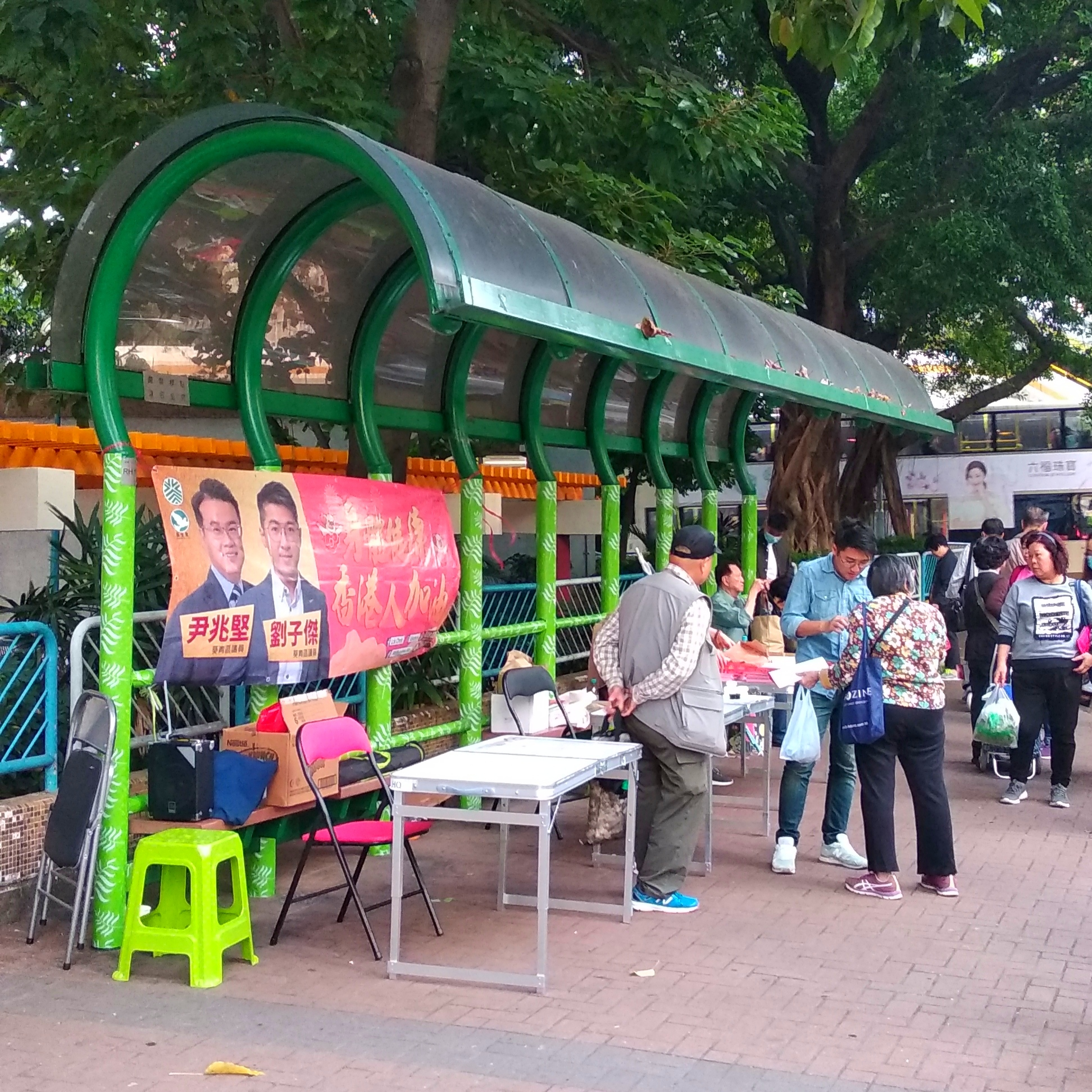 中文（香港）: 農曆新年前夕的劉子傑（圖右穿藍色上衣、牛仔褲、白色鞋者）。